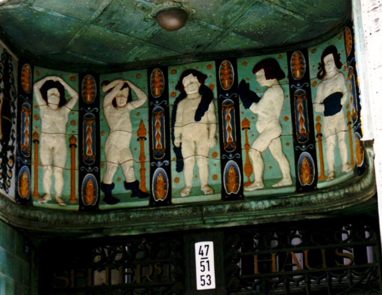 Leipzig,"Selters & Weinert" Nikolaistraße/ am Brühl. Fries an einem ehemaligen Handelshaus eines Rauchwarenhändlers